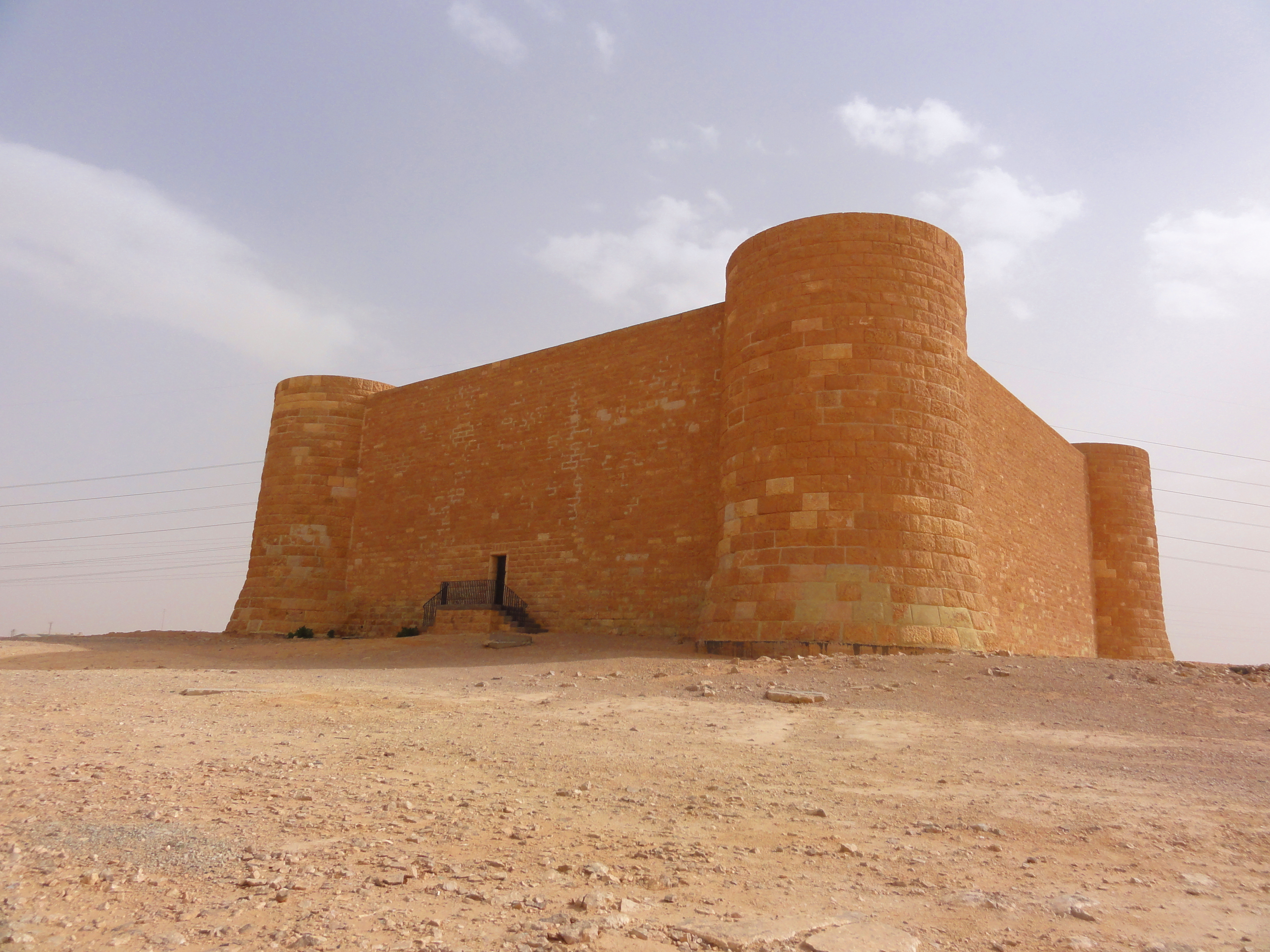 German memorial WW2